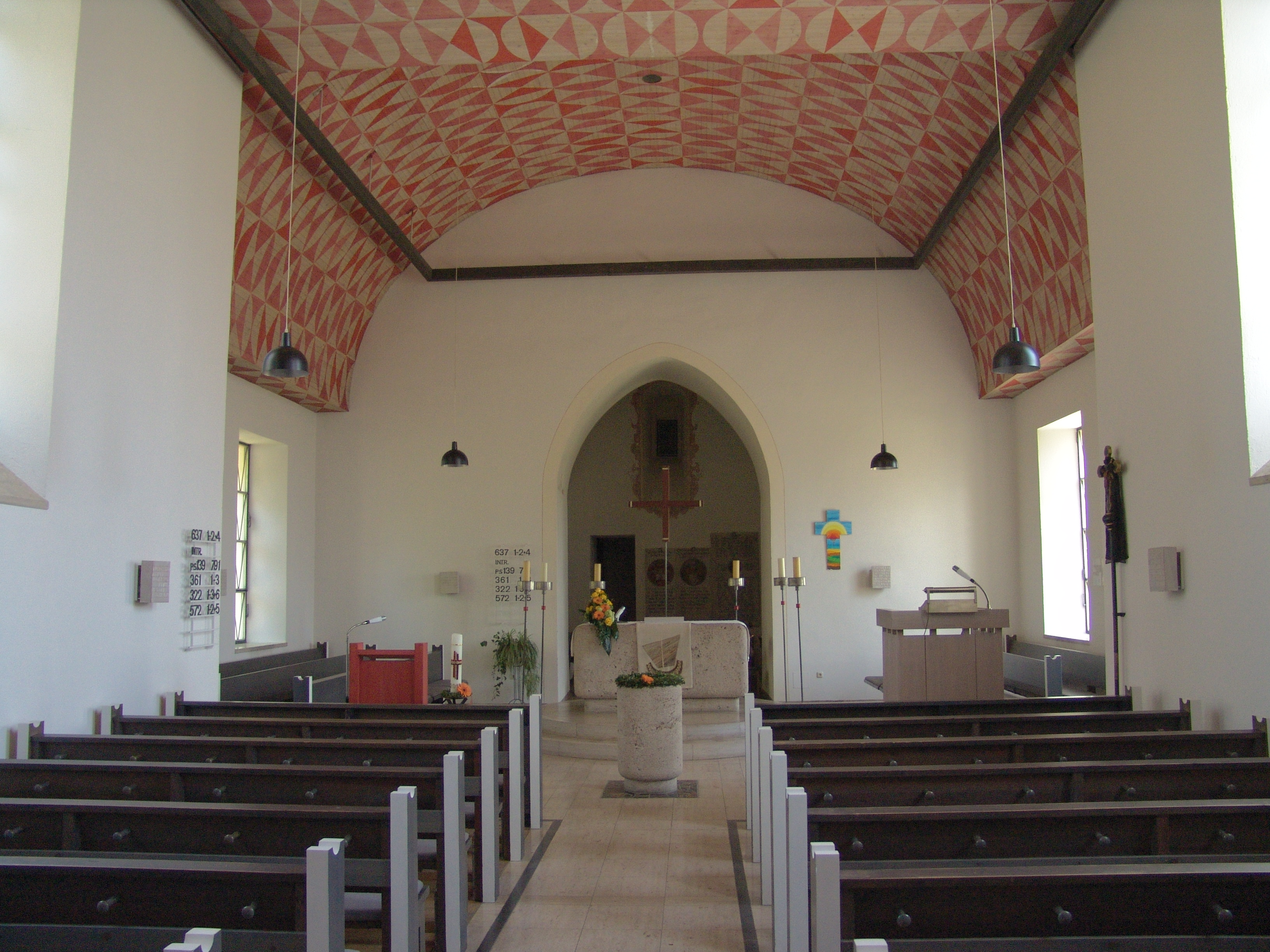 evang.-luth. Kirche St. Stephanus in Alerheim